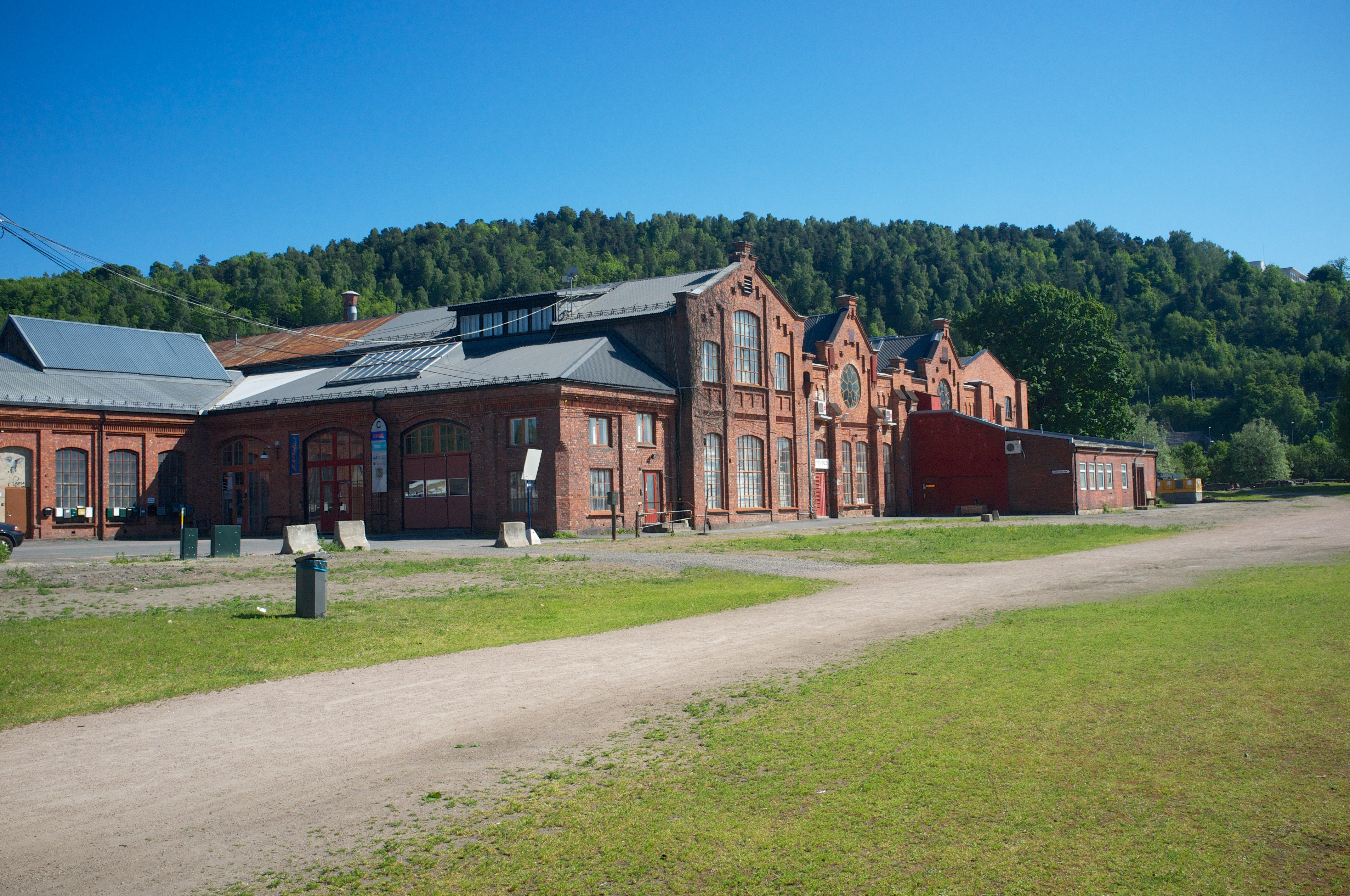 Fra Middelalderparken i Oslo.